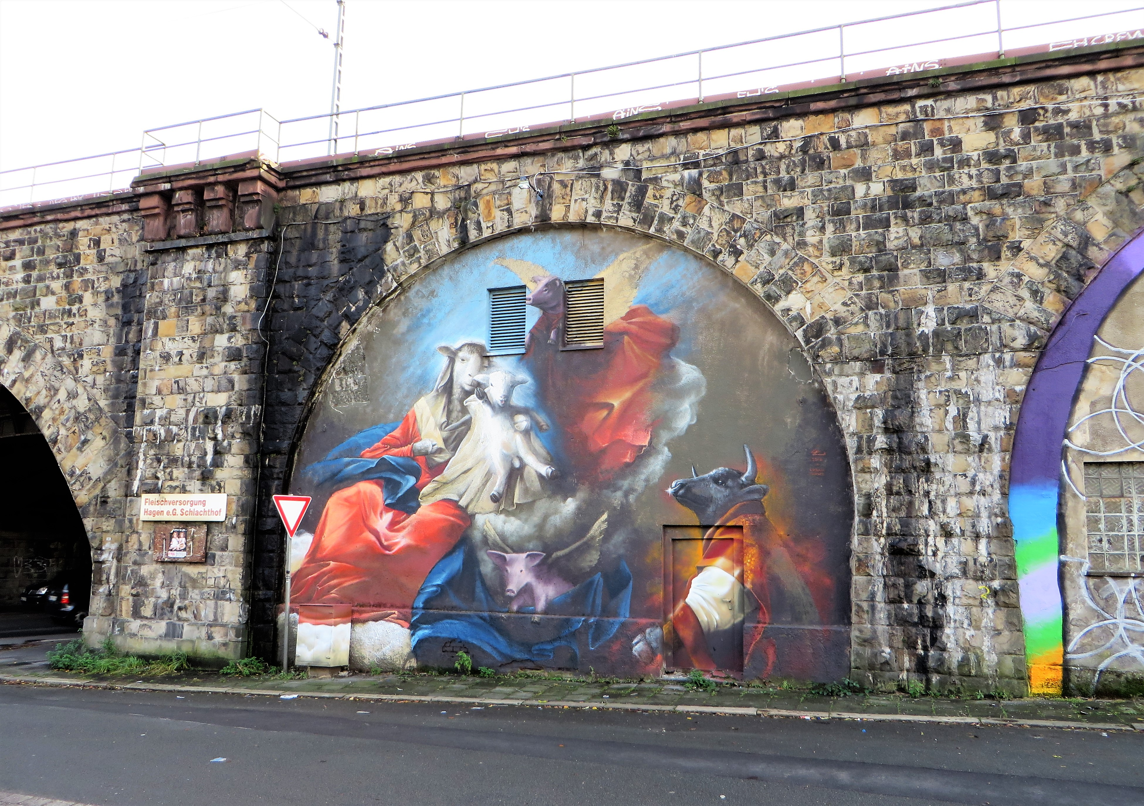 Freiluftgalerie „Urban Heroes Art-Festival“ in Hagen-Wehringhausen. Streetart-Objekt: Schlachthofstraße 1. Künstler: Guido Zimmermann 2017. Titel: „Die Jungfrau erscheint Philip Neri“.